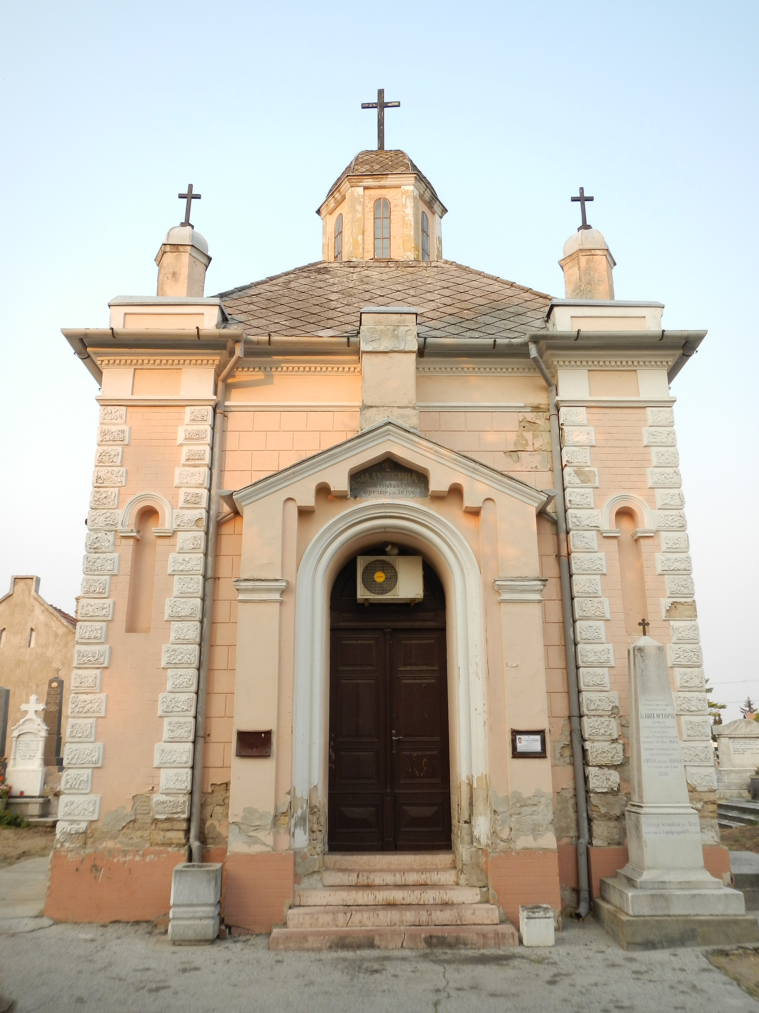 Задужбинска капела Остојић посвећена је великомученику светом Георгију и лоцирана је са десне стране Православног гробља у Суботици. Капела представља леп пример напуштања јужноугарског типа грађевина са звоником на прочељу уз задржавање елемената неокласицизма и наговештава обнову српско-византијског стила. Капела је саграђена 1881. по пројекту суботичког архитекте Титуса Мачковића.